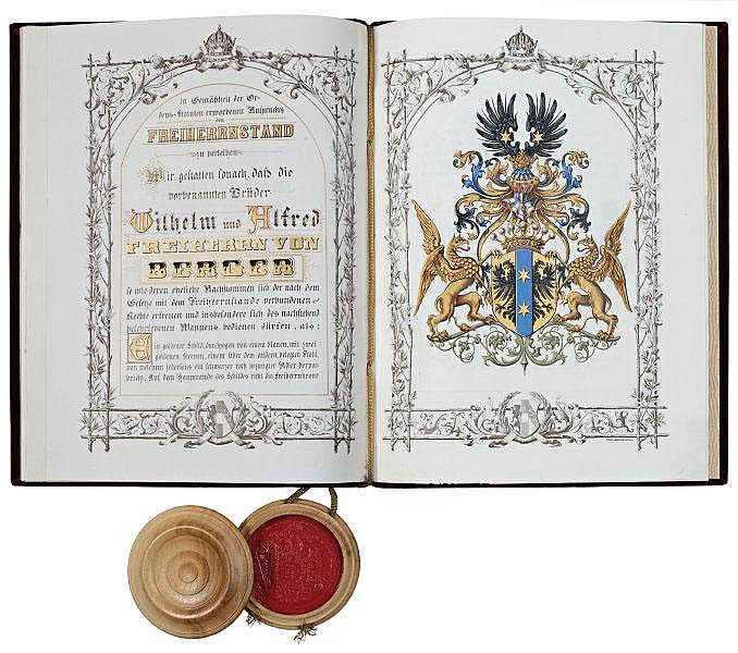 Seiten 4-5 des Freiherrendiploms von Franz Joseph I. (Kaiser von Österreich, 1830-1916) für die Brüder Dr. Wilhelm und Dr. Alfred Berger "auf Grund des von ihrem Vater Dr. Johann Berger, Wirklichen Geheimen Rats und Minister als Ritter des Ordens der Eisernen Krone 1. Classe in Gemäßheit der Ordens-Statuten erworbenen Anspruchs". Der erwähnte Dr. Johann Nepomuk Berger (1816-1870) war Landtags- und Reichsratsabgeordneter sowie Minister. Von seinen Söhnen wirkte Dr. Alfred Berger (1853-1912) als Dramaturg, Theaterdirektor und Schriftsteller; 1910-12 leitete er als Direktor das Wiener Burgtheater. Freiherrendiplom ausgestellt am 4. Juli 1878 in Wien, eigenhändige Unterschrift des Kaisers. Pergamentlibell (Format 38 x 29 cm), 7 Seiten, Text in schwarzer und goldener Tinte, lithographierte Bordüre mit Blättern und Rankenwerk. Wappendarstellung signiert "Carl Boess". Zwischen den kalligraphierten Textseiten Schutzblätter. Crèmefarbener Seidenmoiré-Vorsatz. Violetter Samteinband mit goldgeprägtem Kaiserwappen, anhängendes kaiserliches Lacksiegel in Holzkapsel.